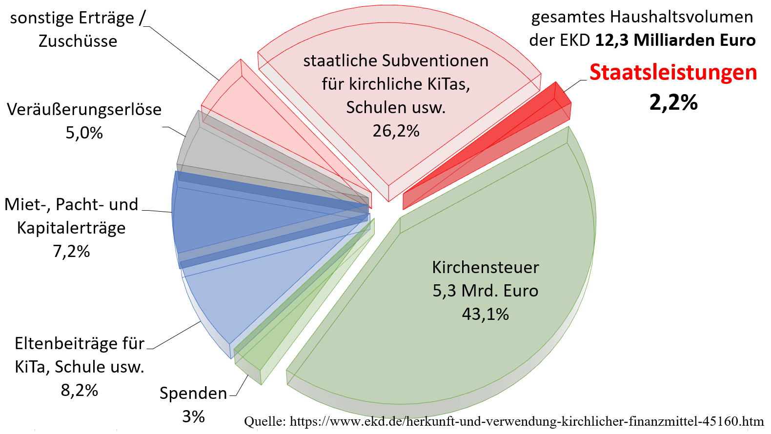 Anteil Staatsleistungen am Haushaltsvolumen der EKD